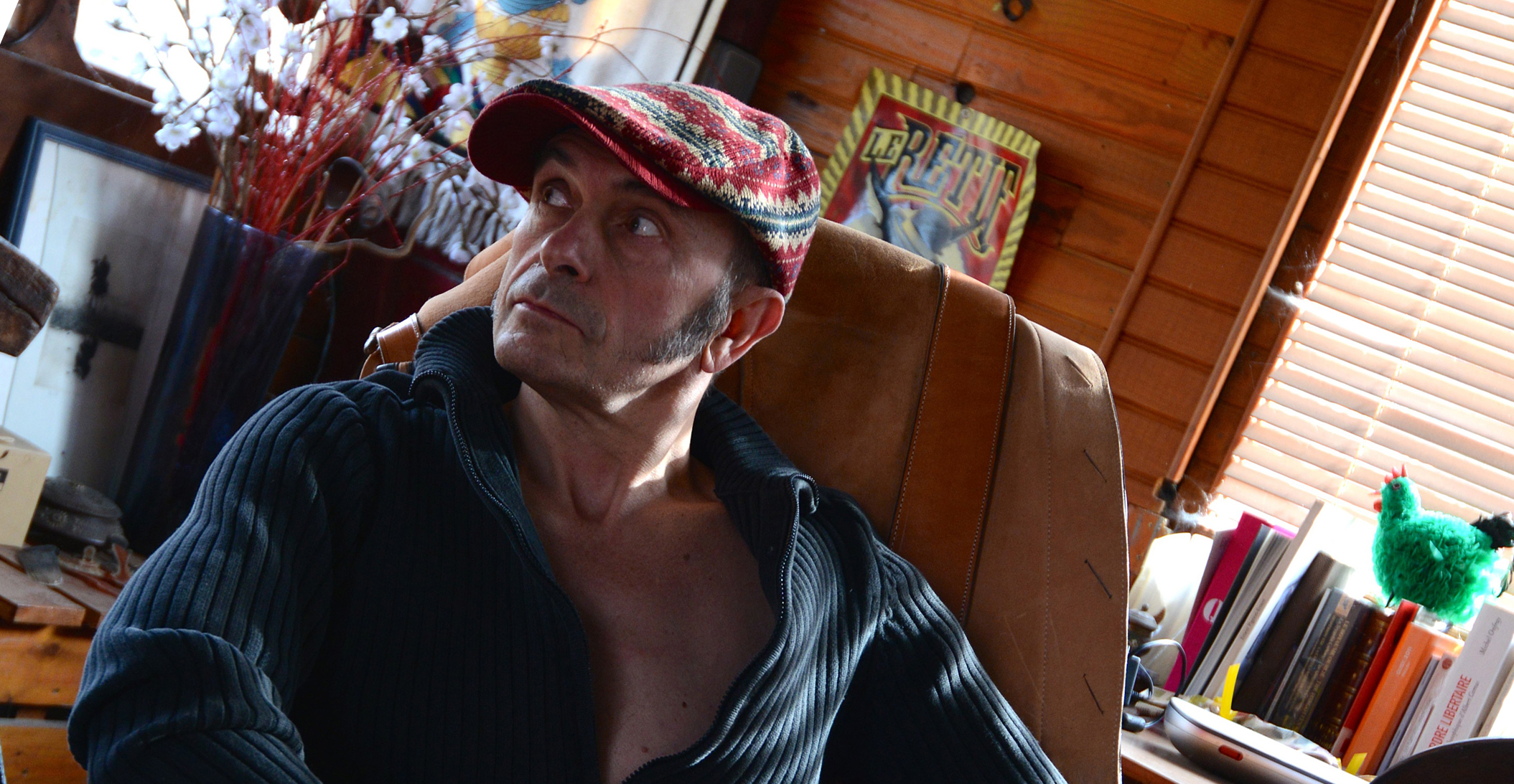 portrait de Bartabas